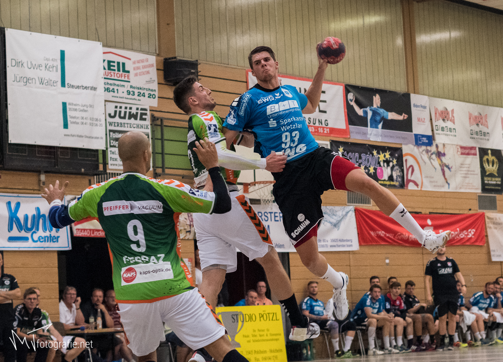 Lipovina setzt sich durch